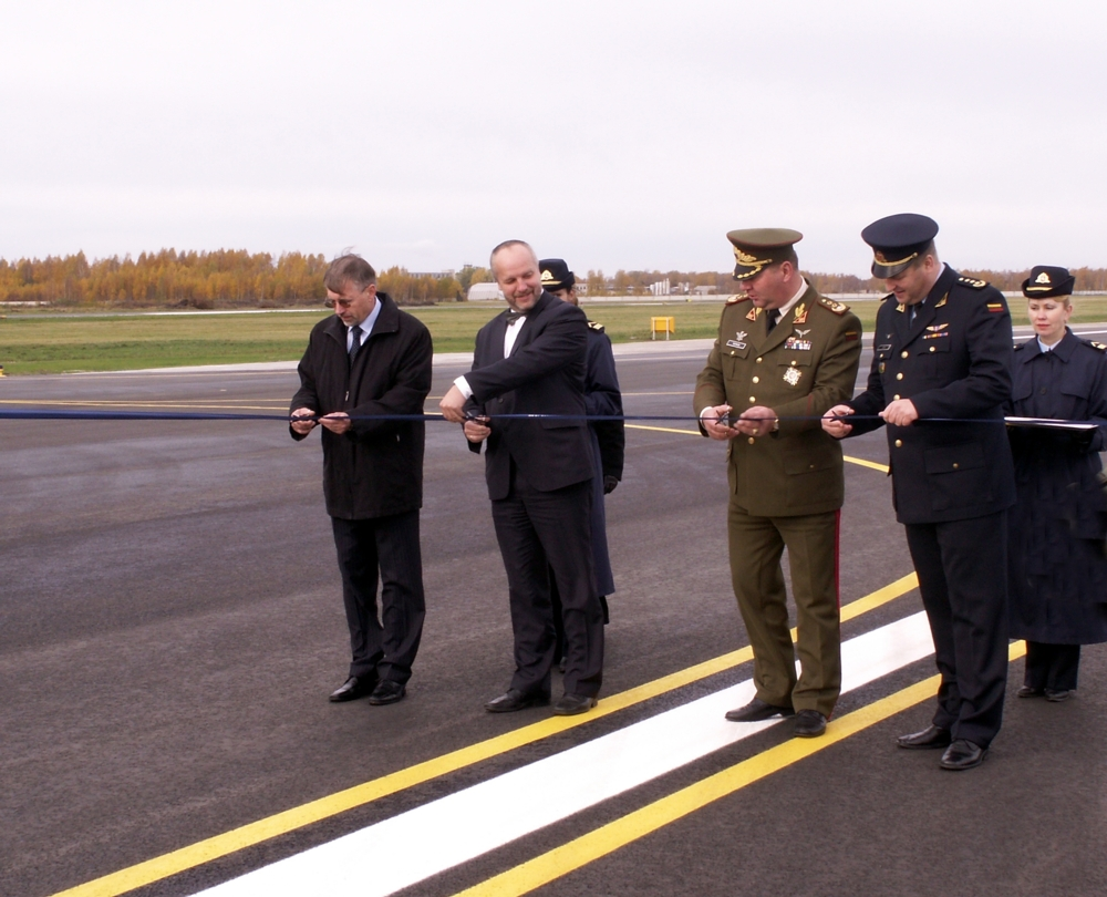 Kirkilas, Olekas, Tutkus, Leita